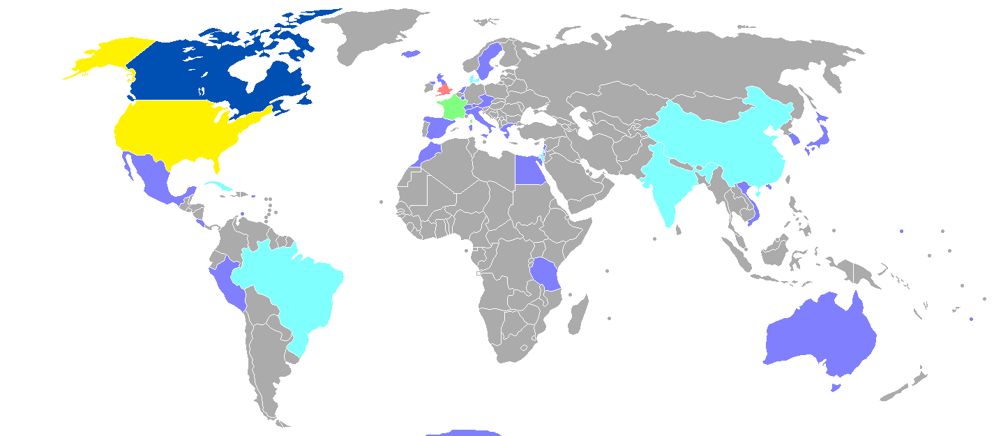 Carte des pays visités par la famille Simpson Pays d'origine des Simpson Pays visités une fois par la famille Pays visité deux fois par la famille Pays visité quatre fois par la famille Pays visité sept fois par la famille Pays visité neuf fois par la famille